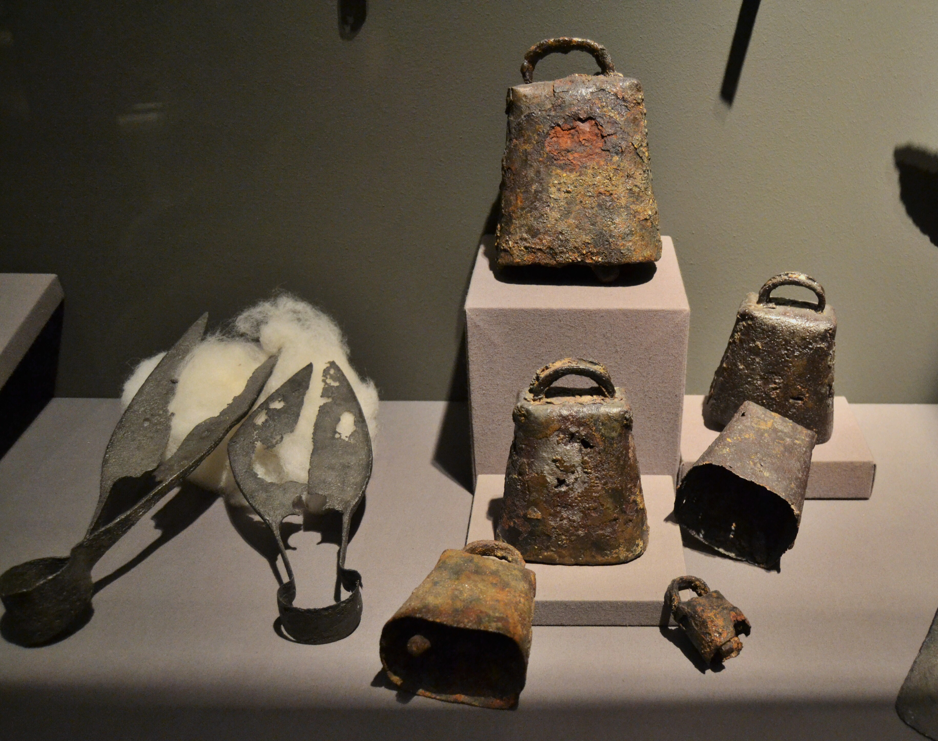 Instruments agrícoles, tisores d'esquilar i esquellots, s. III dC, Neupotz, Museu Històric del Palatinat (speyer). Exposició El Tresor dels Bàrbars del Museu Arqueològic d'Alacant.